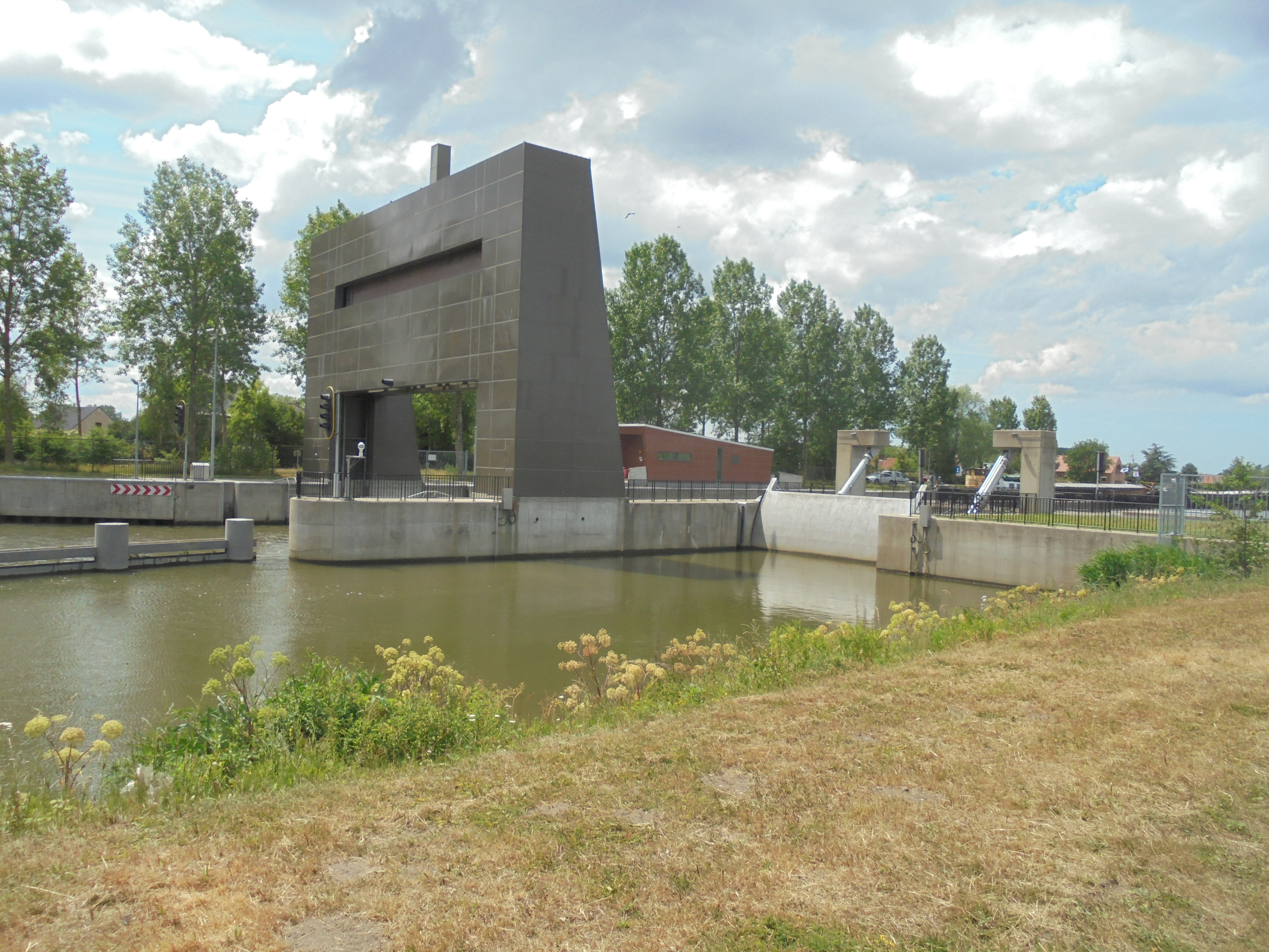 Keersluis - Overzet (straatnaam) - Beernem - West-Vlaanderen - België.Noordkant richting Brugge.